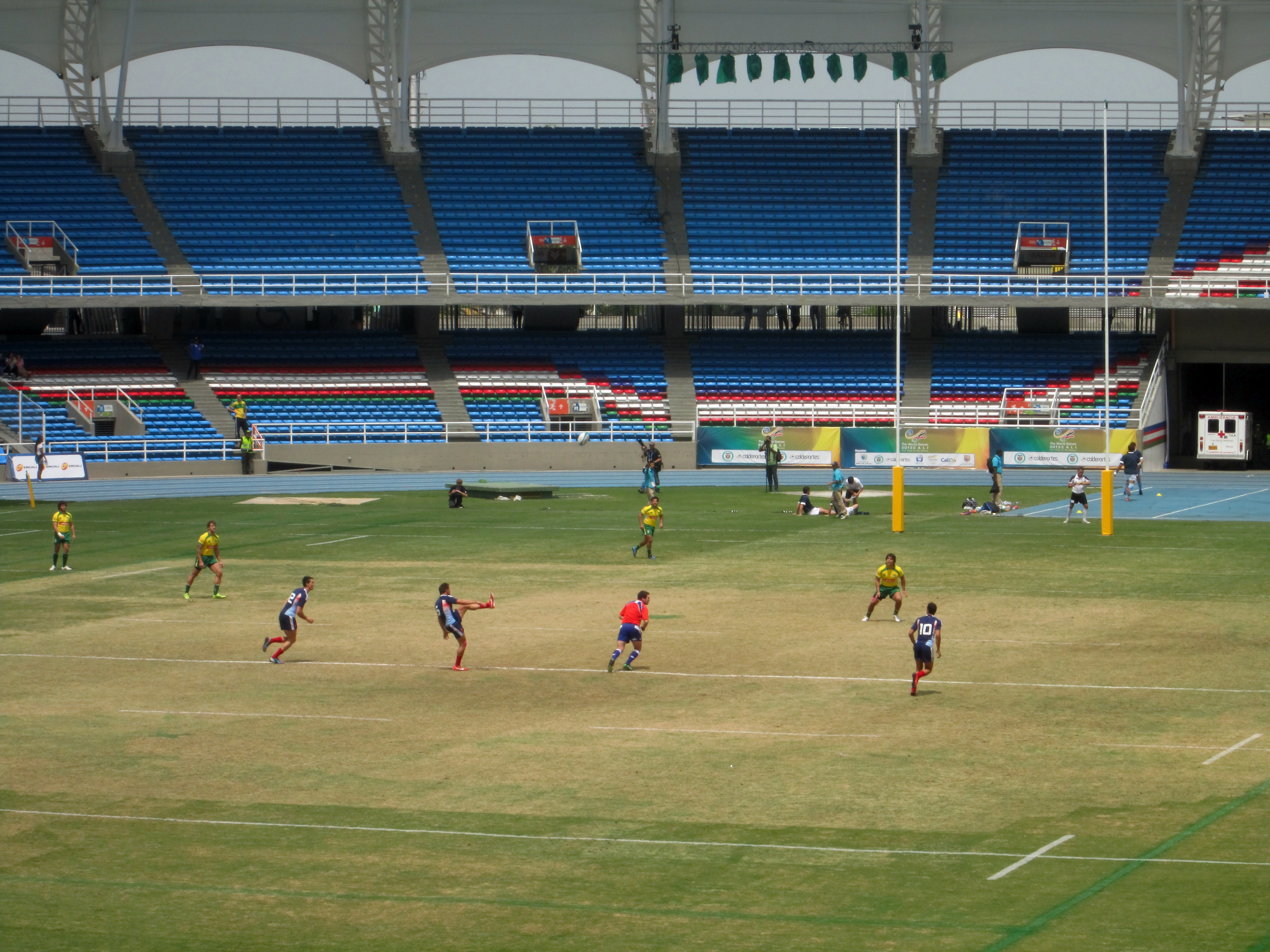 Rugby sevens game Brasil vs Francia at World Games 2013